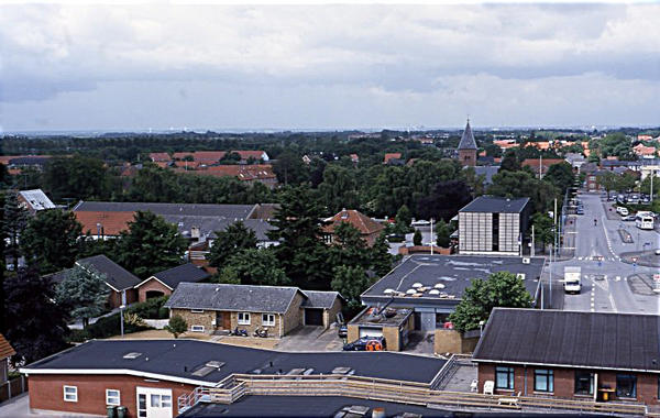 Udsigt over ikast by